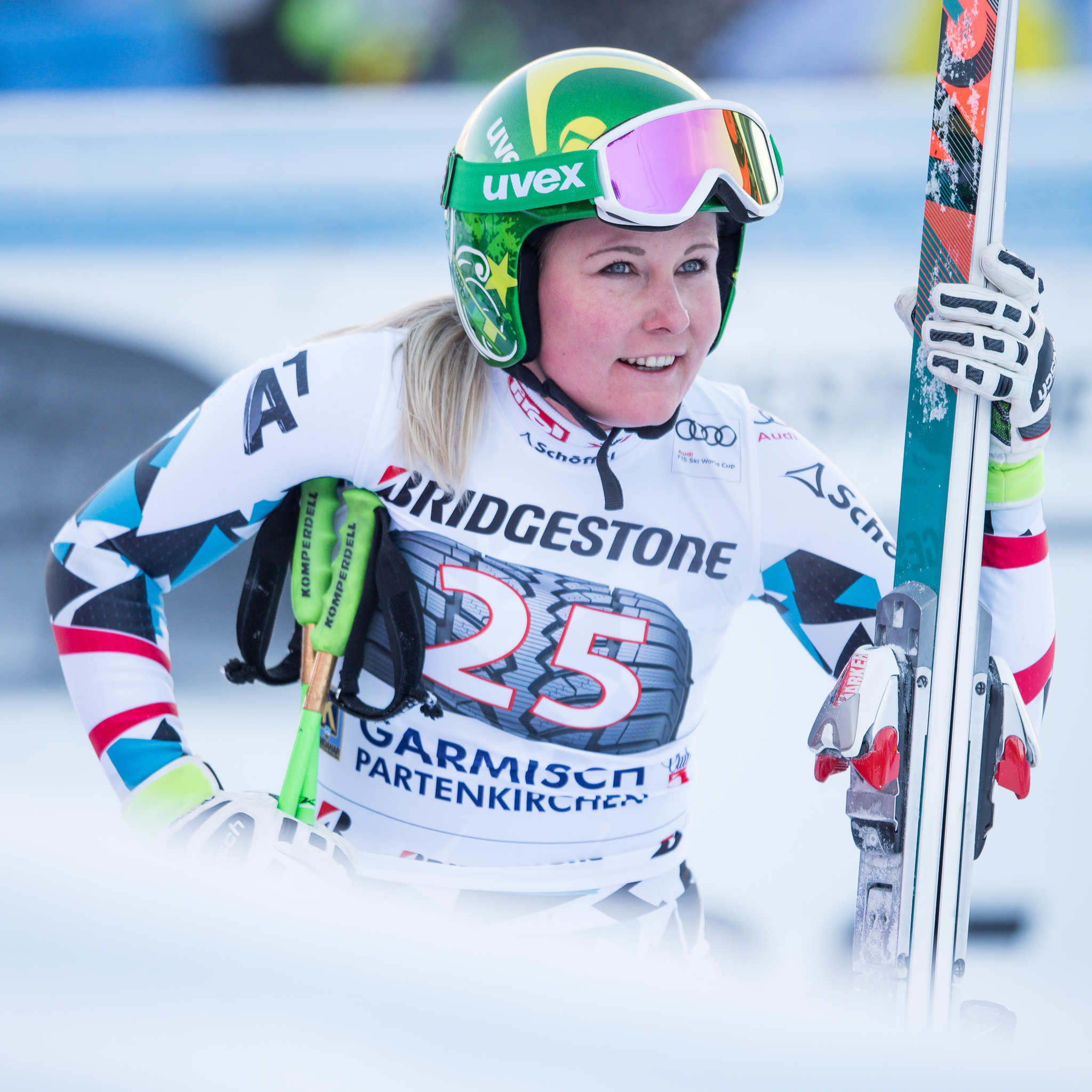 64. Kandahar Rennen,Audi FIS Ski Weltcup Garmisch-Partenkirchen,Damen Abfahrt,Kandahar,Ladies Downhill,Tamara Tippler